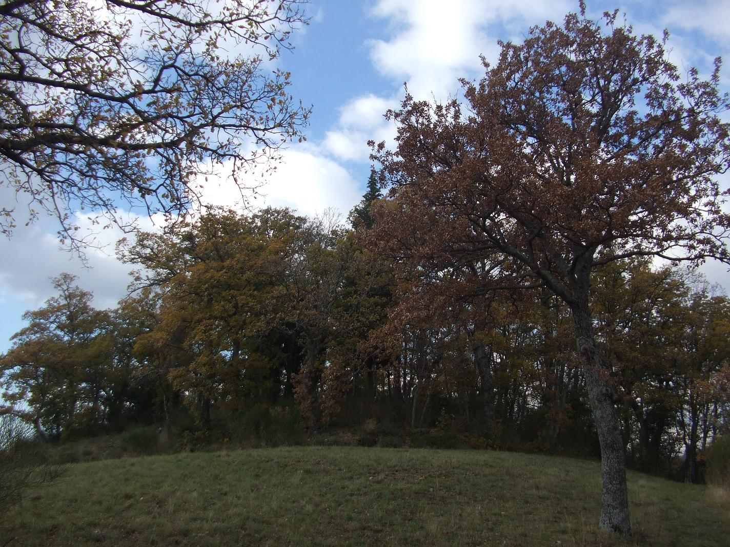 La chiesa di San Martino a Polvano